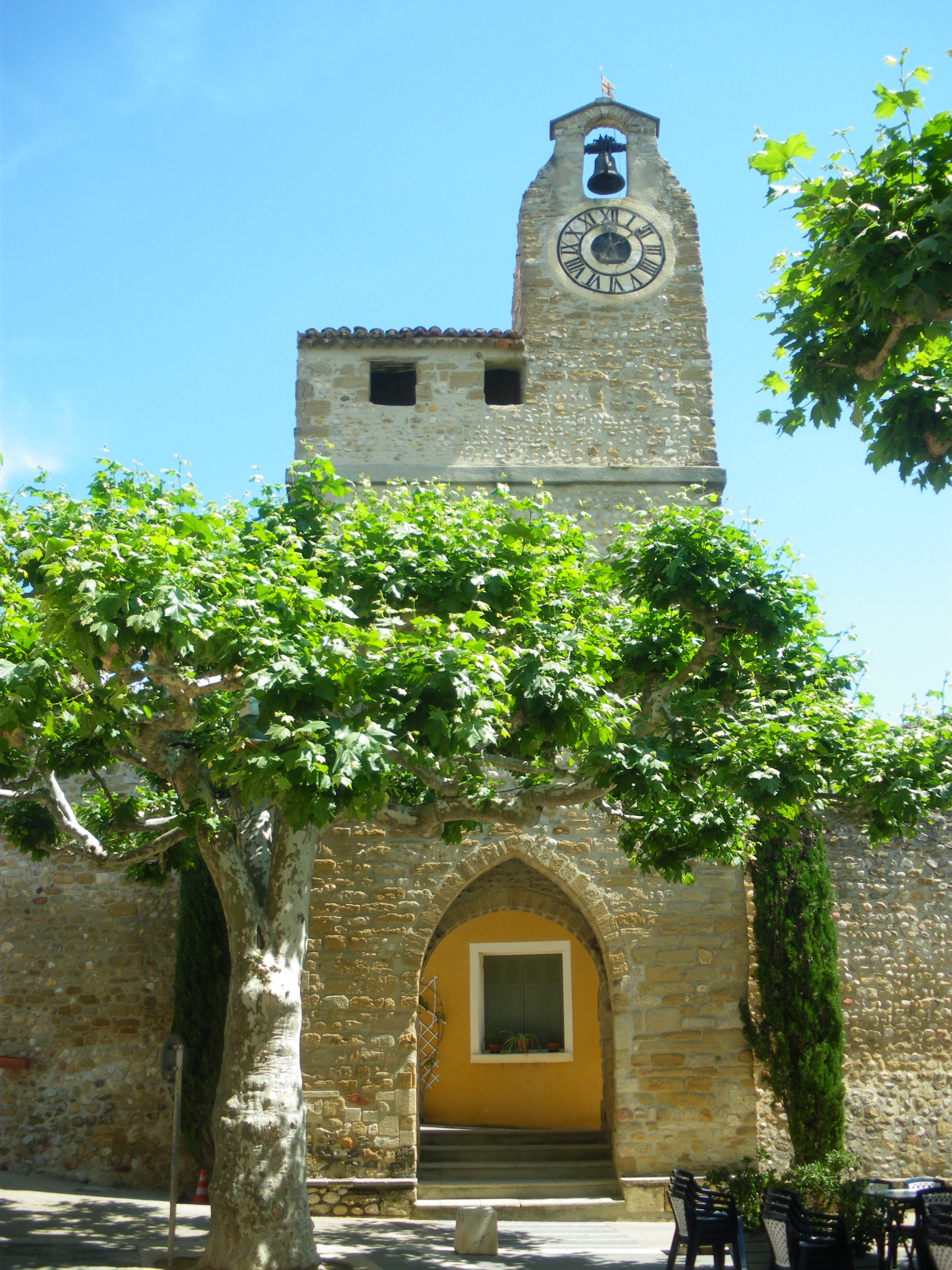 Beffroi de Villedieu, Vaucluse